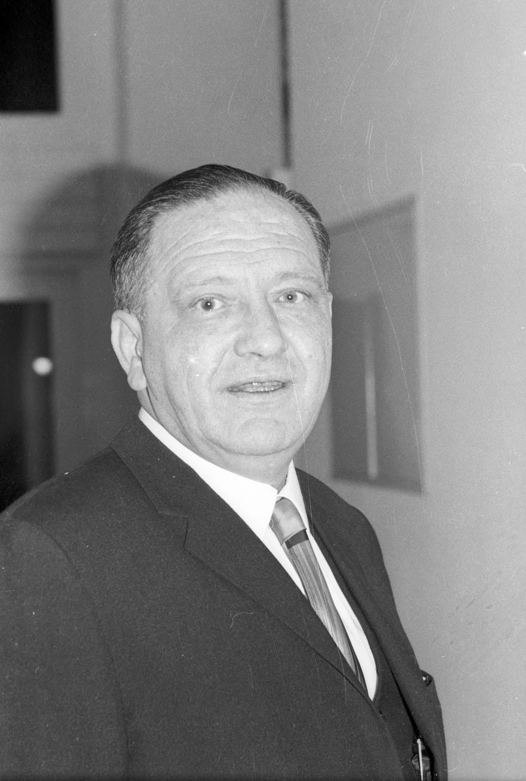 von der Theologischen Fakultät der Christian-Albrechts-Universität (CAU). Referent der Kieler Universitätstage 1968.